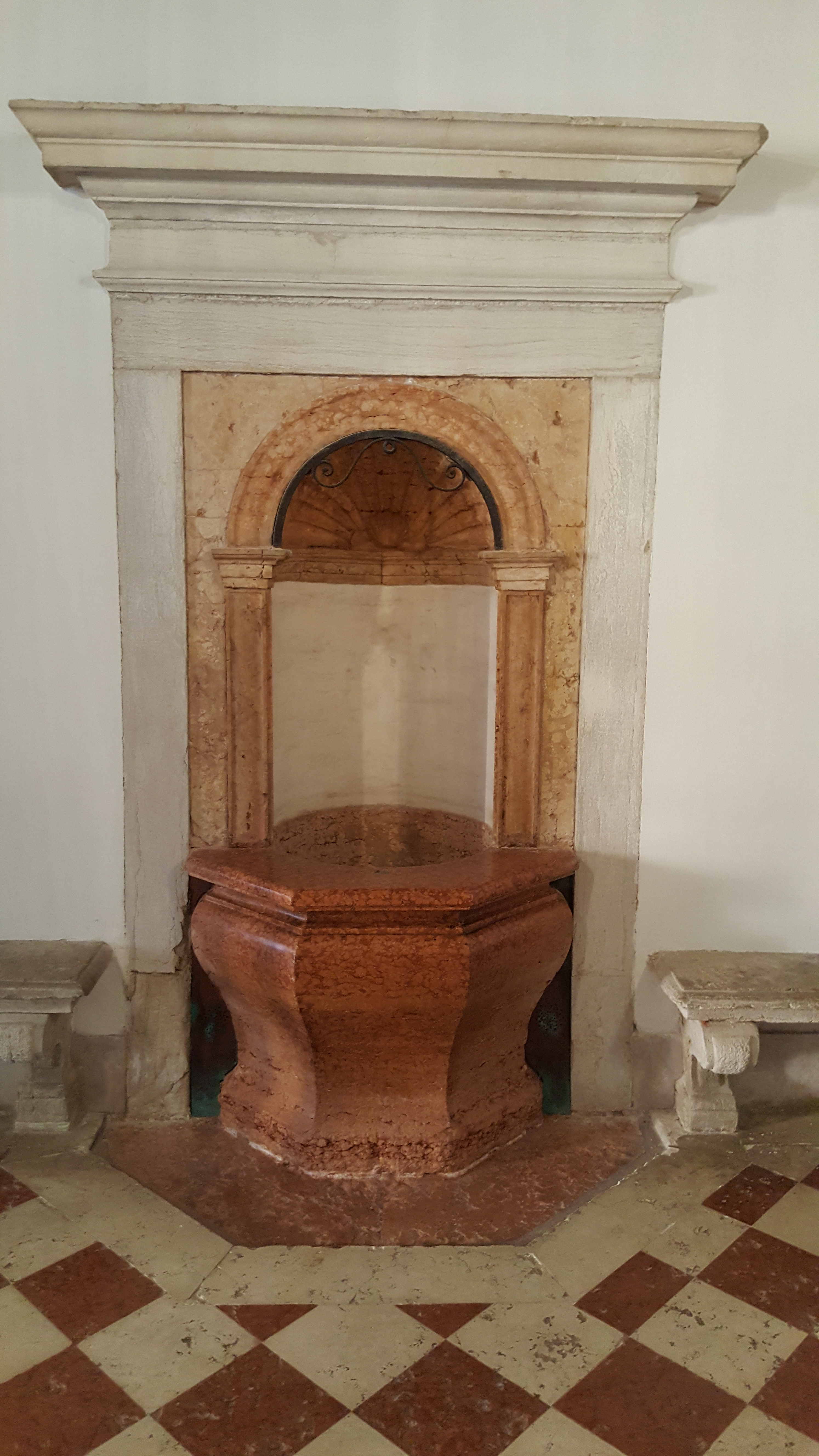 Roter Marmorbrunnen des Tessiner Steinmetzen Antonio Gesia im Wassergeschoss, 16. Jahrhundert